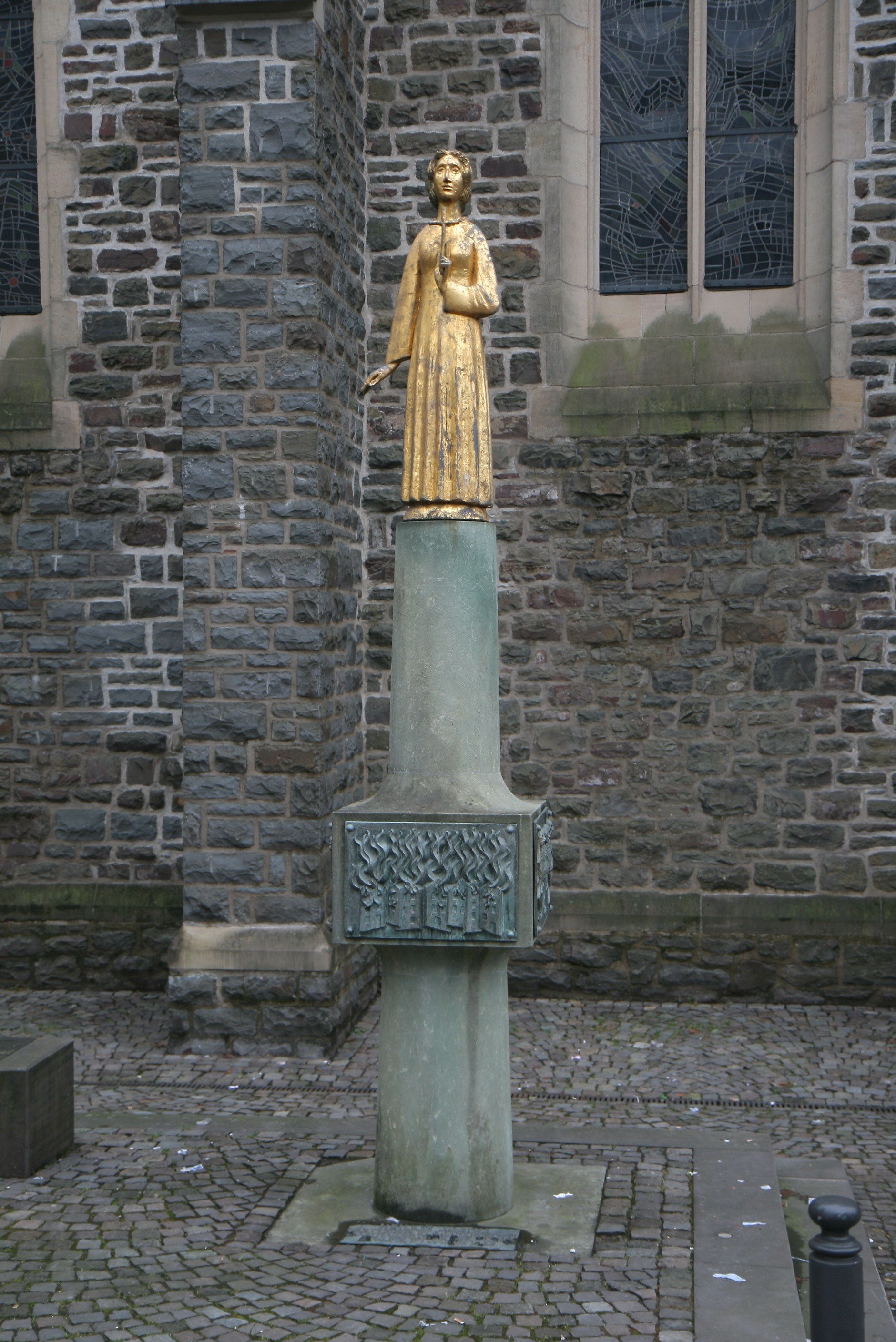 Agatha-Statue, am nördlichen Seitenportal der Pfarrkirche St. Martinus in Olpe. Errichtet 1979 von Josef Baron. Beschreibungstafel an der Statue: Heilige Agatha. Märtyrerin im 3. Jahrhundert. Agatha-Gelübde der Olper Bürger im Jahre 1665.